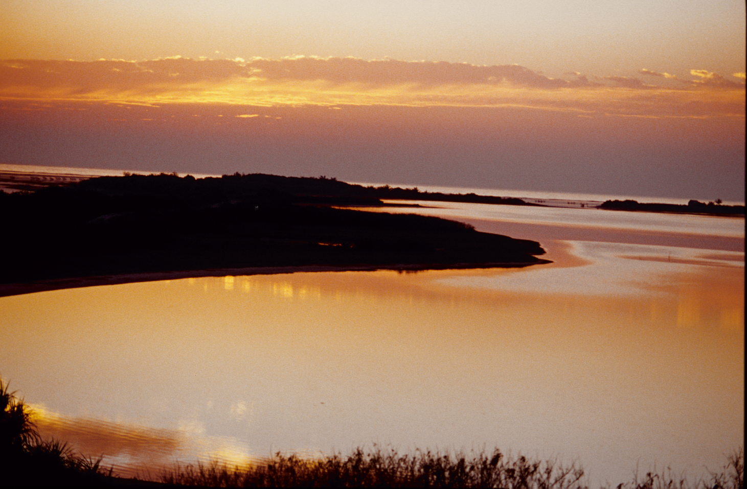 中文（台灣）: 潟湖 黃昏 八據點